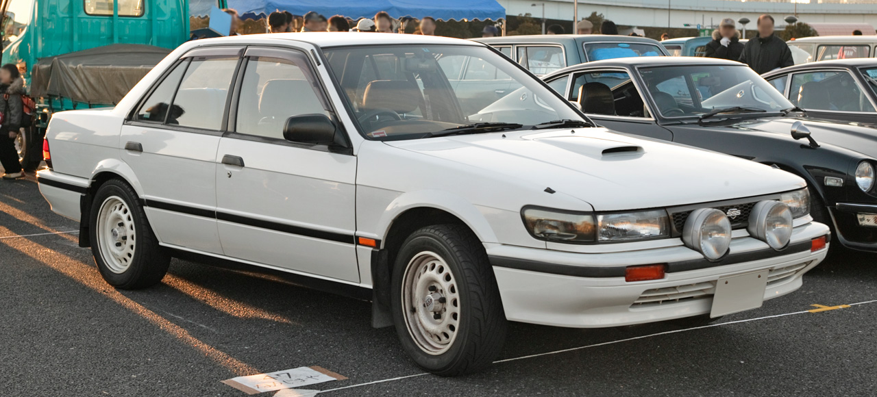 Nissan Bluebird SSS-R ( HNU12（改） )